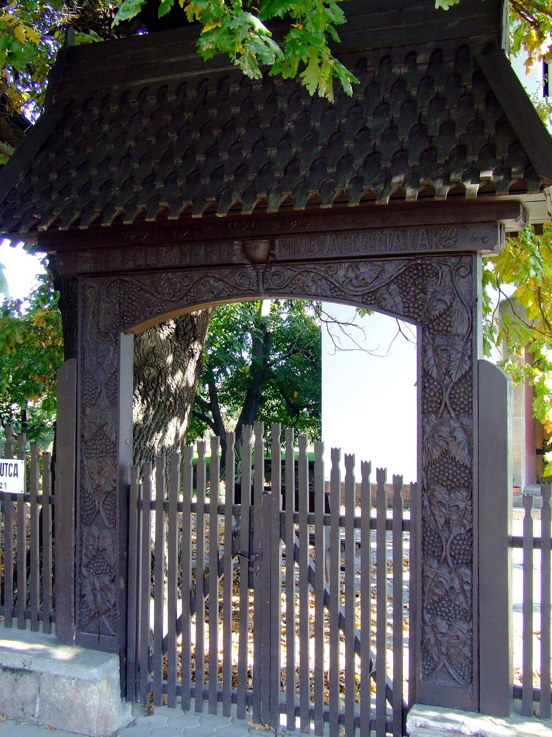 A bácsalmási református templom udvarának faragott székelykapu bejárata